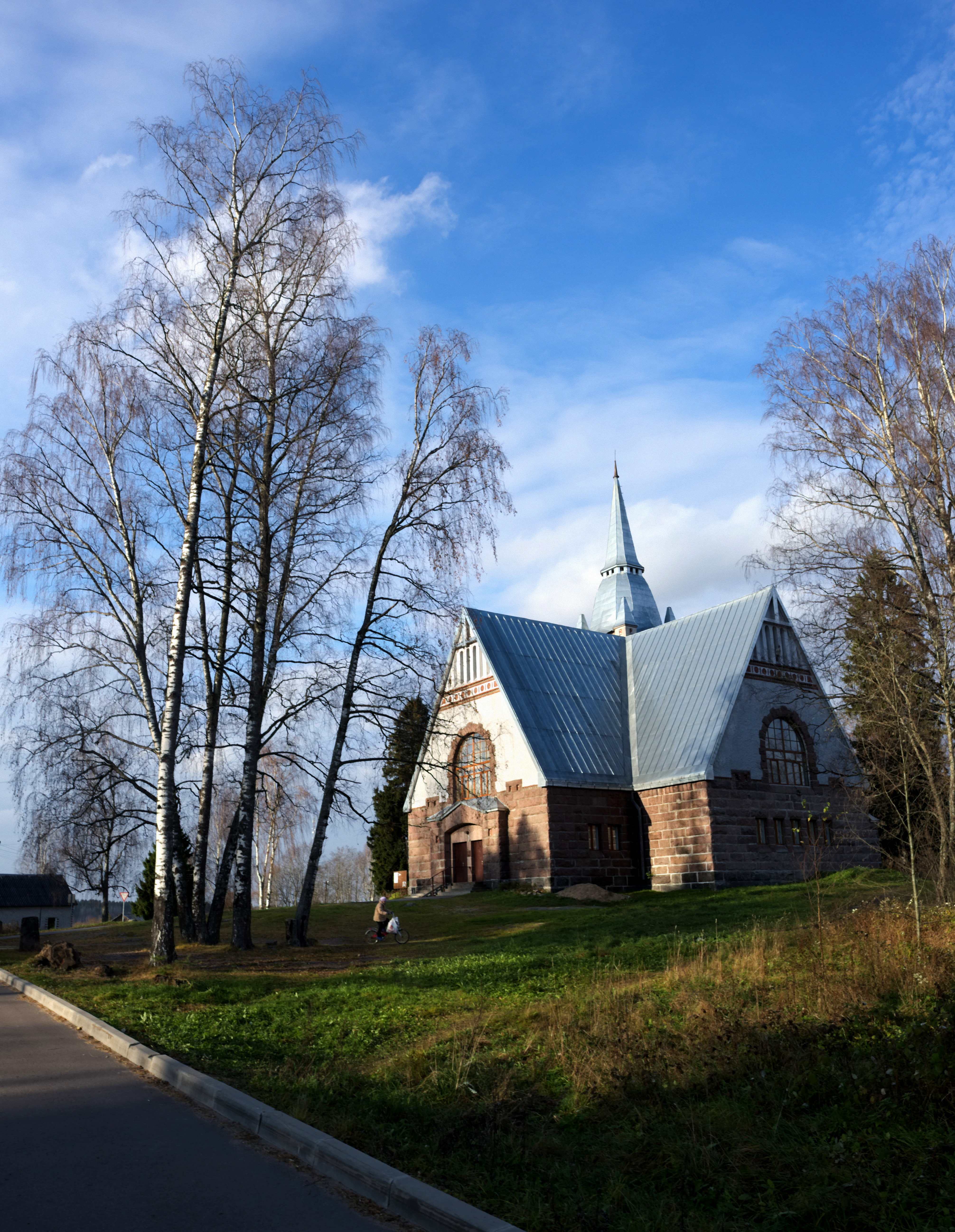 Räisälän kirkko 24.10.2016